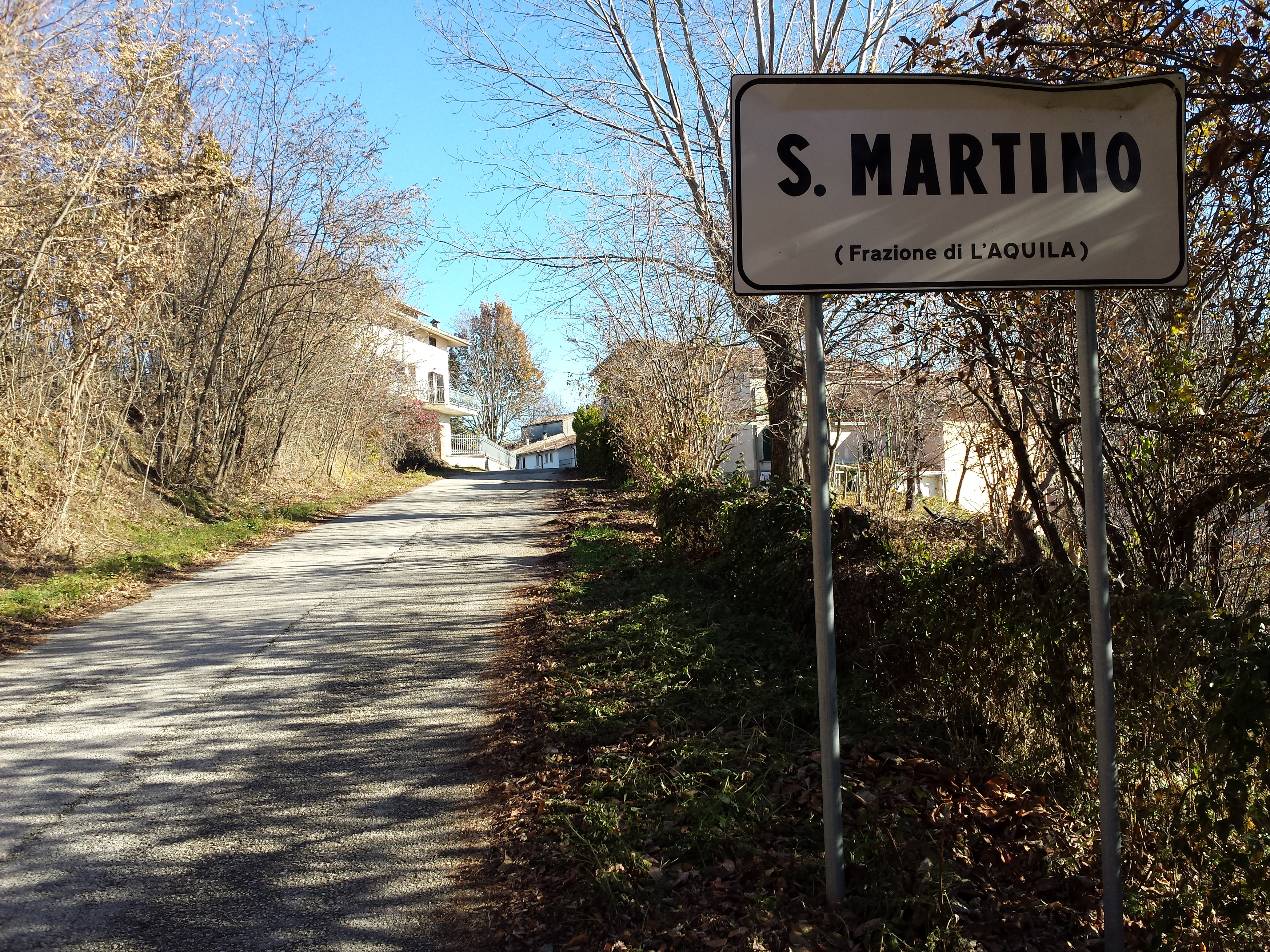 San Martino (L'Aquila)